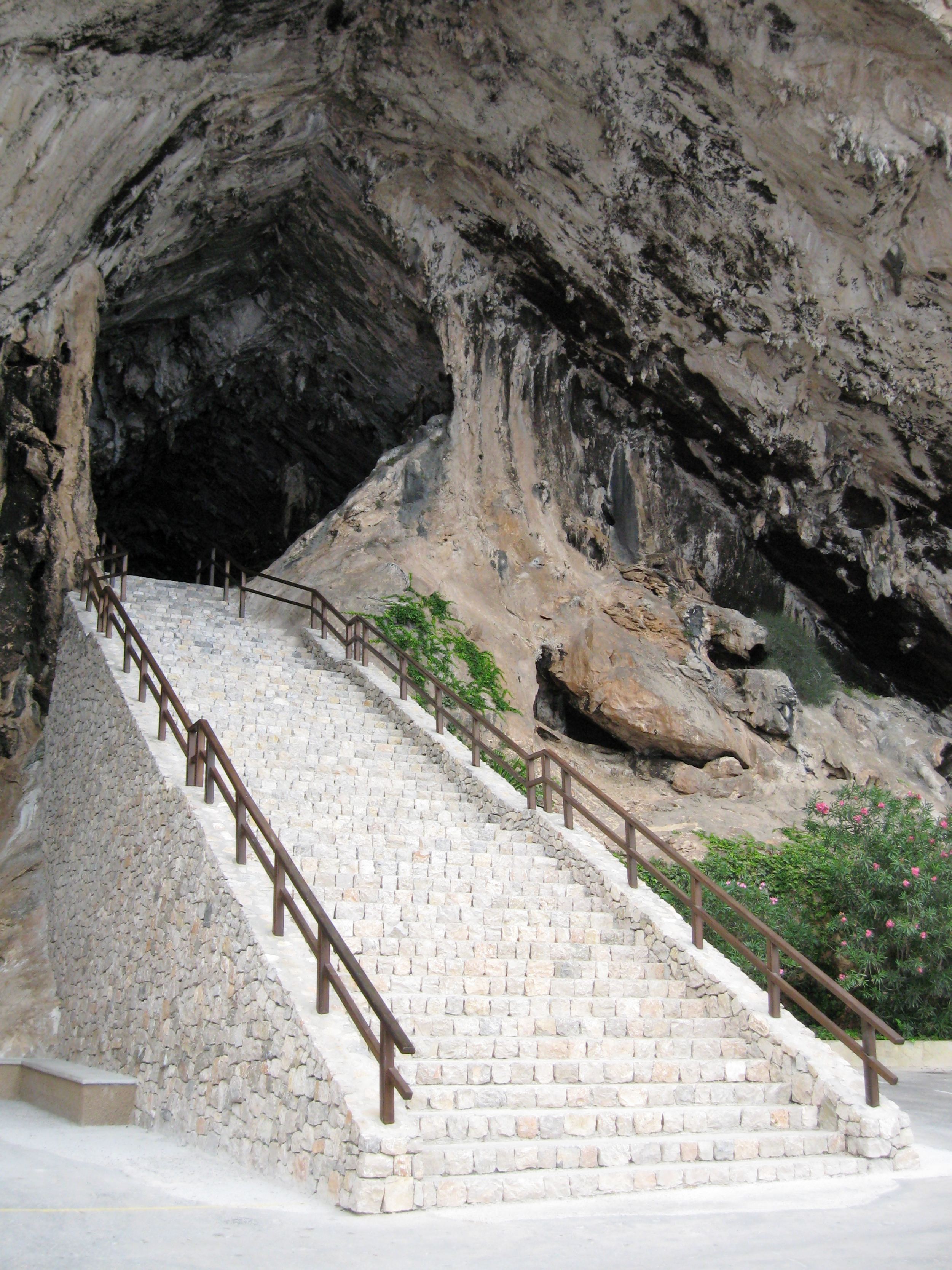 Ausgang der Coves d’Artà, Gemeinde Capdepera, Mallorca, Spanien